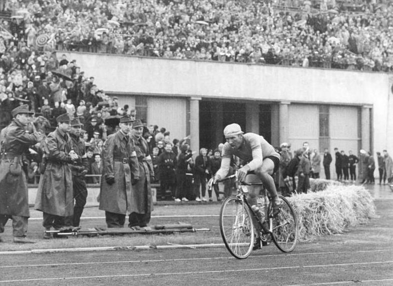 Friedensfahrt, Leipzig, Tscherepowitsch Zentralbild Tre- Hr10.5.1961 XIV. Internationale Friedensfahrt Warschau-Berlin-Prag 1961. 8. Etappe Berlin-Leipzig. UBz: Tscherepowitsch (UdSSR), der Sieger der 8. Etappe fährt in das Stadion ein.